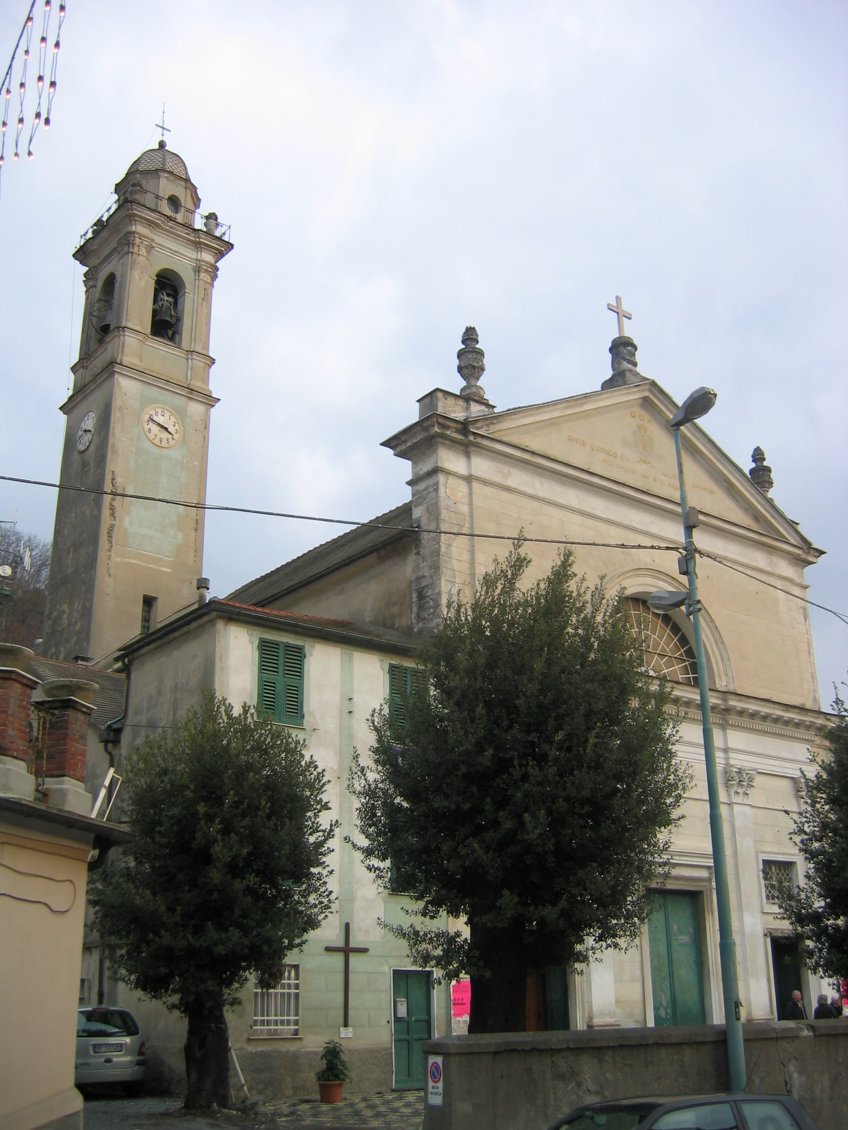 Chiesa parrocchiale di S. Quirico (Genova)